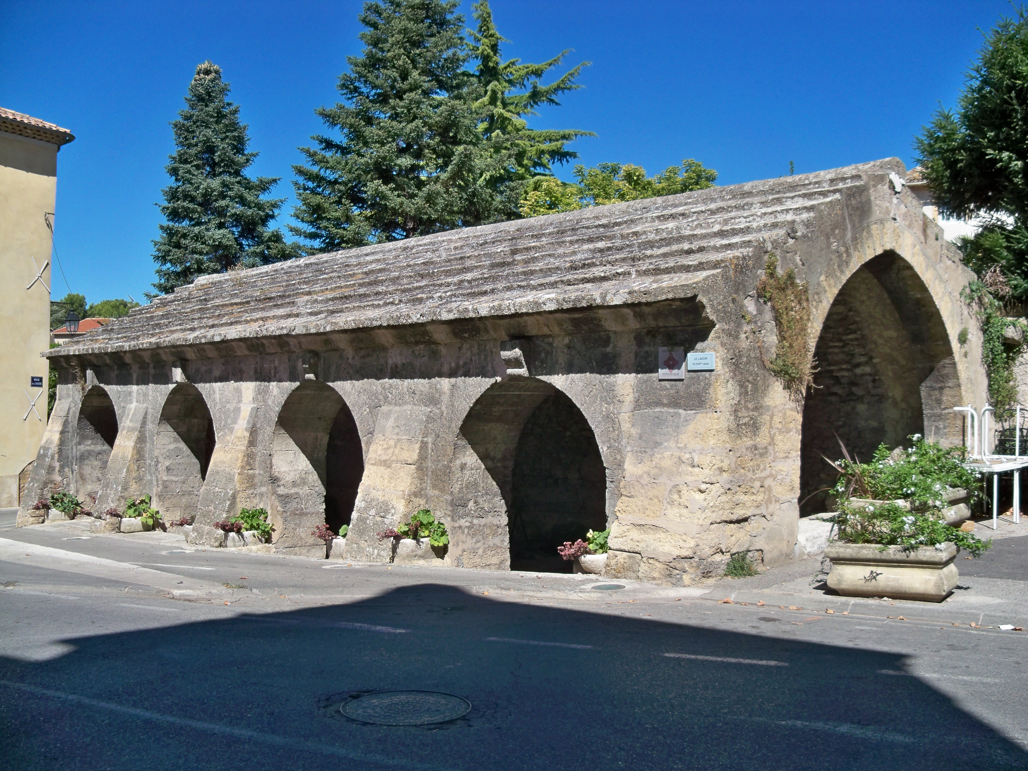 Lavoir de Lambesc, Bouche du Rhône, France